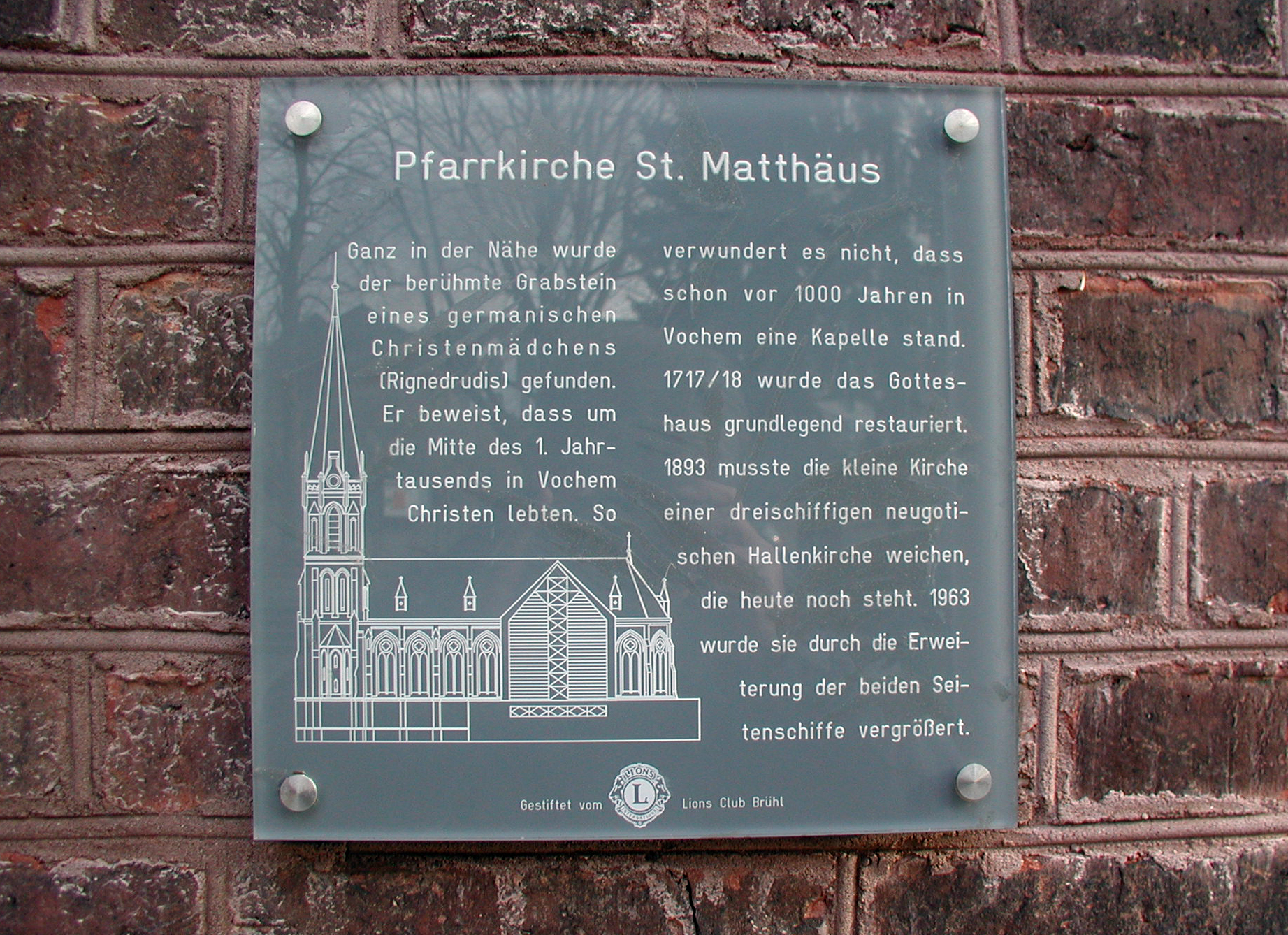 Brühl-Vochem, Sankt Matthäus, Infotafel